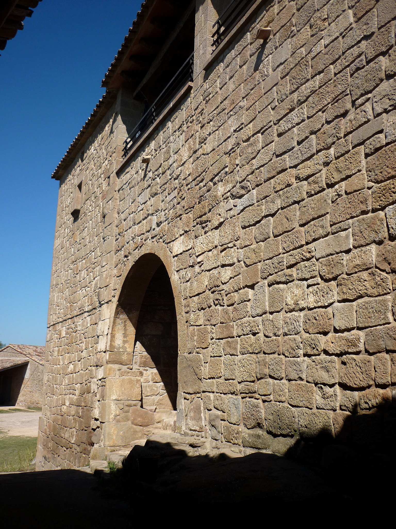 Carrer de l'Església de Sant Just d'Ardèvol (Pinós): entrada al portal